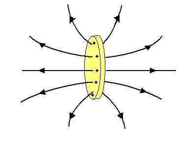 Campo eléctrico producido por una moneda cargada eléctricamente(carga positiva). Electric field of a coin positive electrically charged.